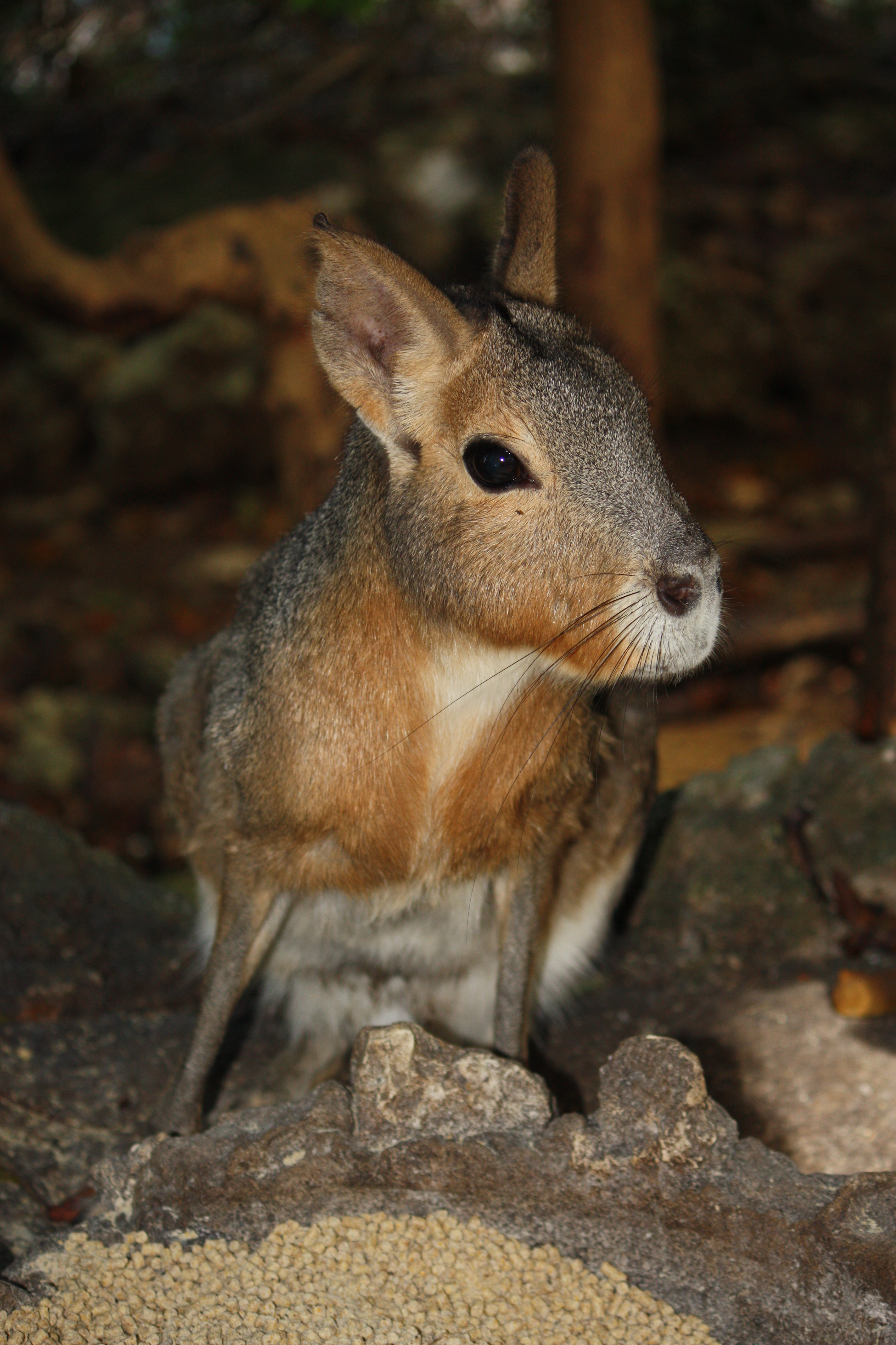 Patagonian Mara (Dolichotis patagonum). Barbados Wildlife Reserve, Barbados.